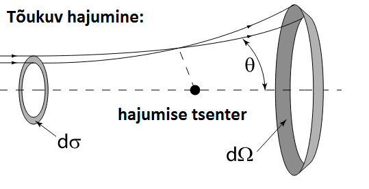 hajumine hajumistsentri ümbruses